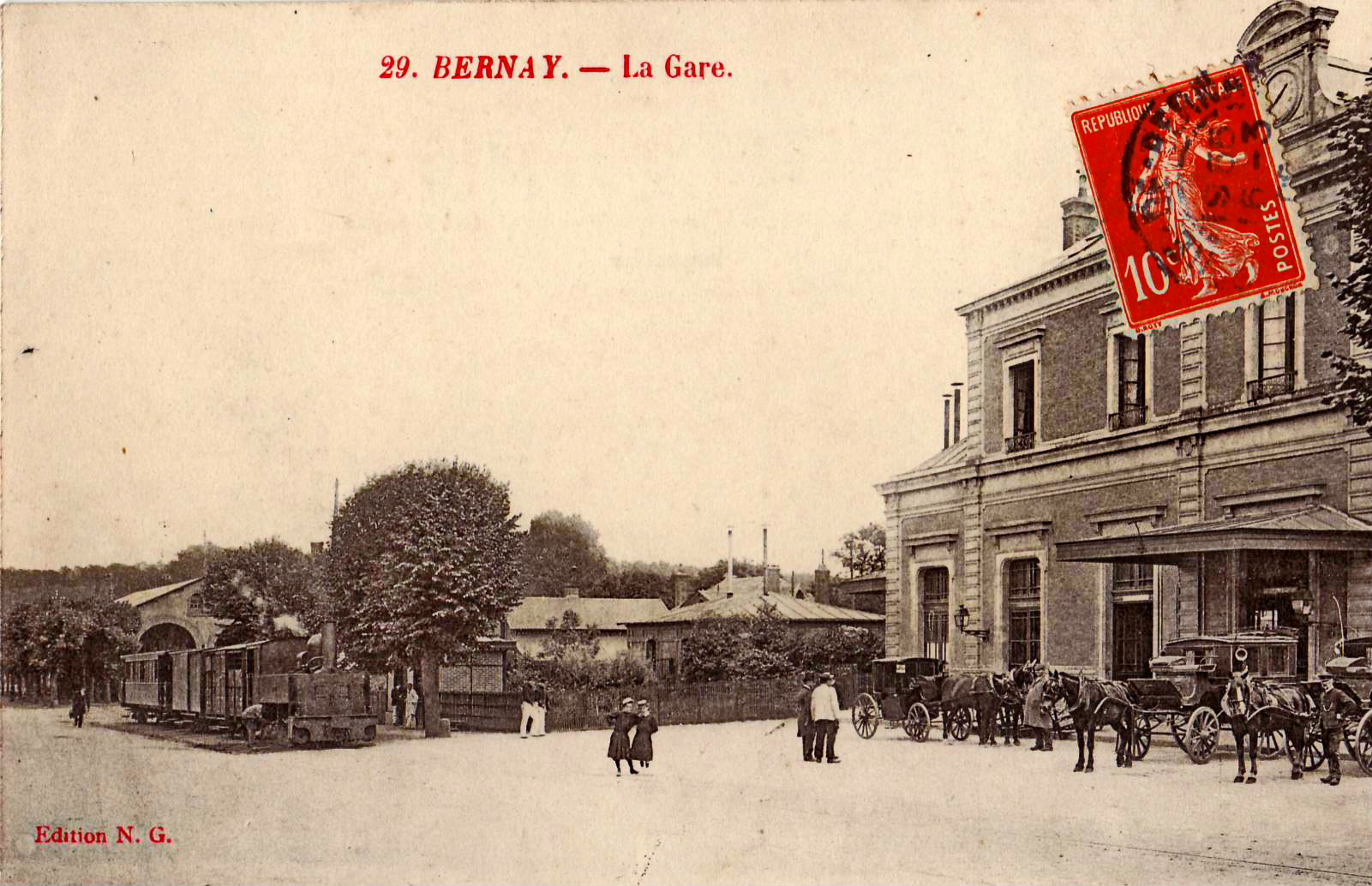 Carte postale ancienne éditée par N. G., n°29 : BERNAY - la Gare